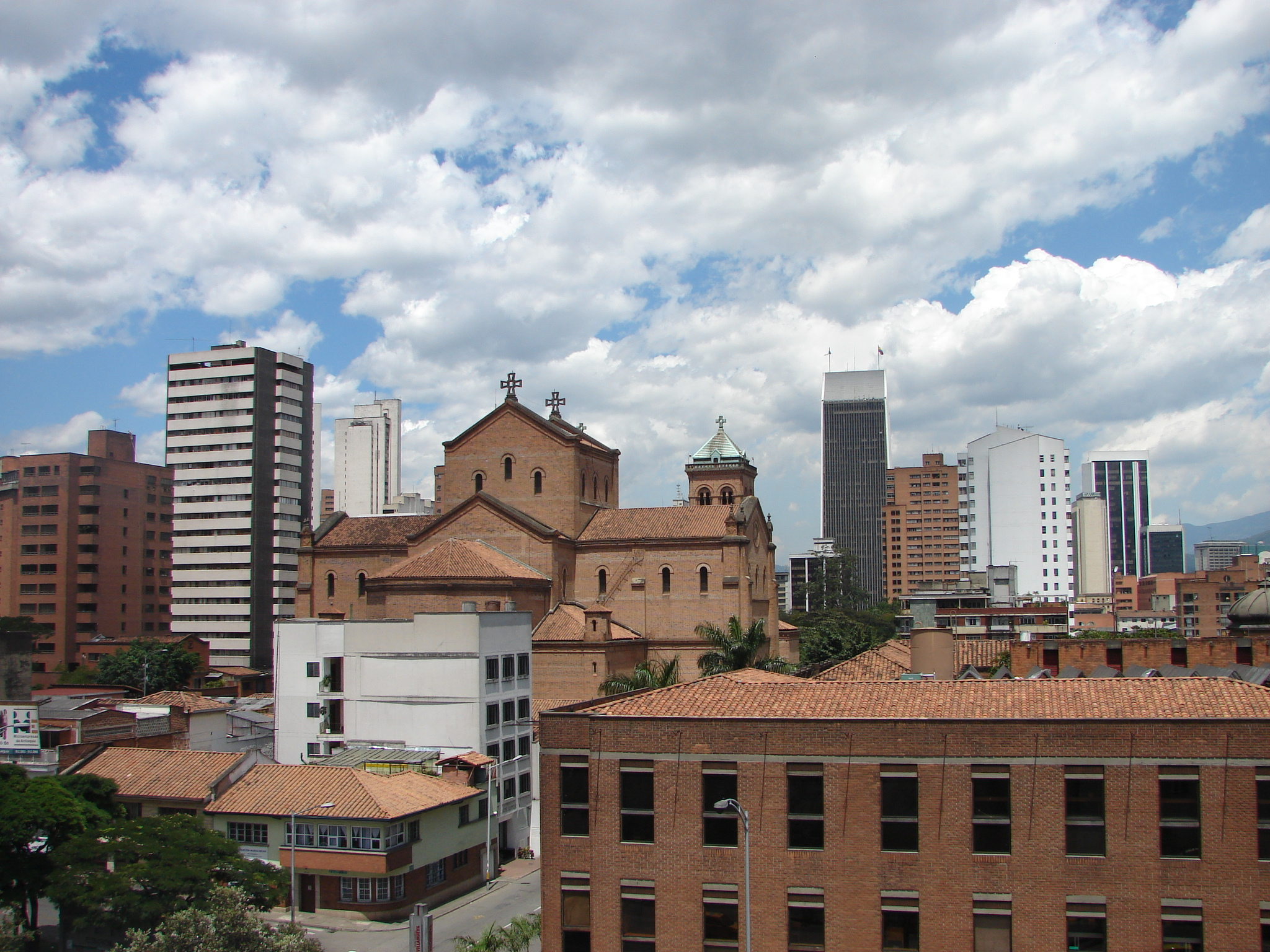 El Centro con la Catedral Metropolitana, Medellín.Colombia